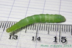 Argyrogramma signata Raupe - chenille